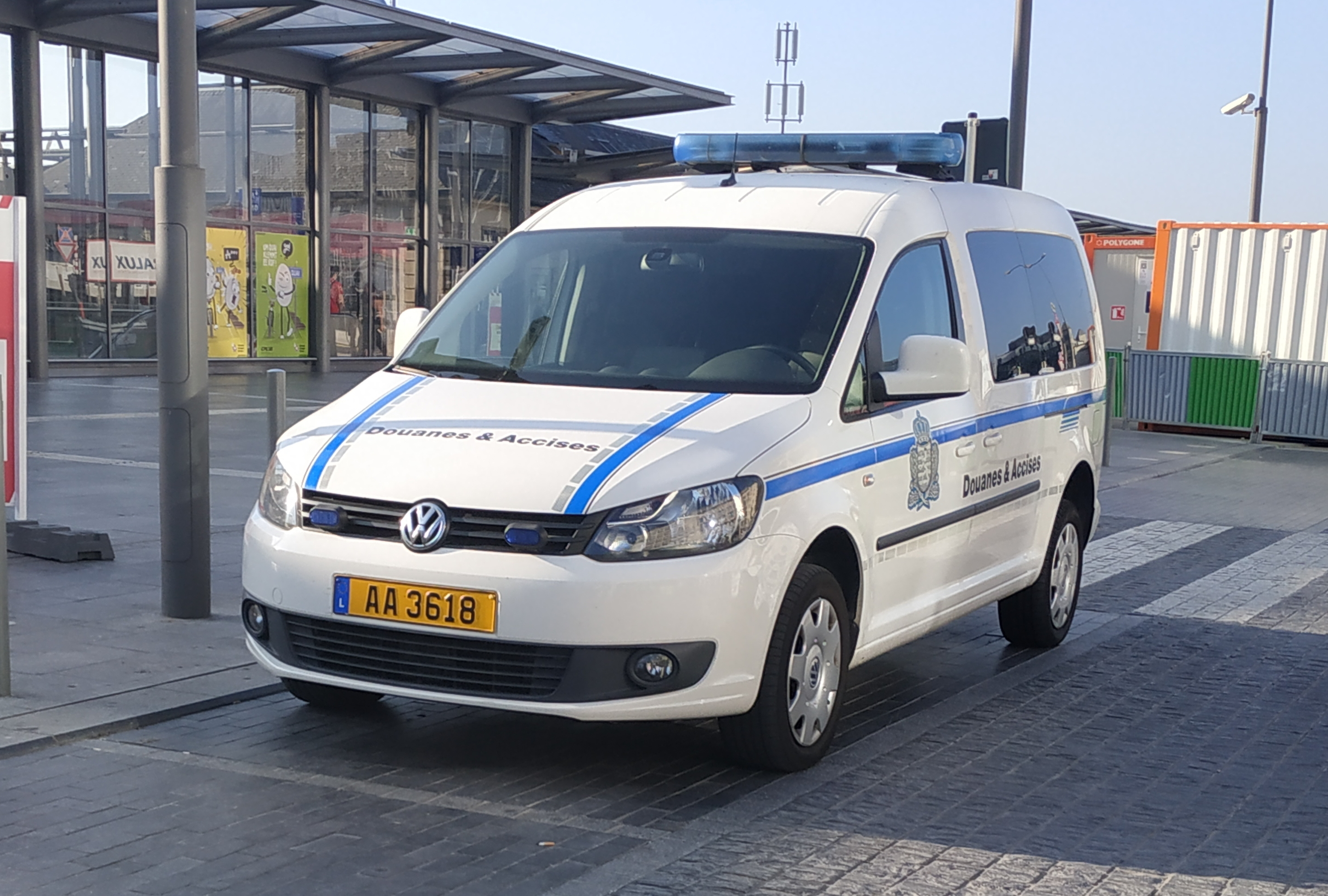 Véhicule Volkswagen des douanes & accises luxembourgeoises à la gare de Luxembourg ville